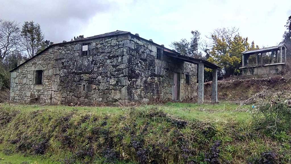 Casa nos Piñeiros, Cabanas.